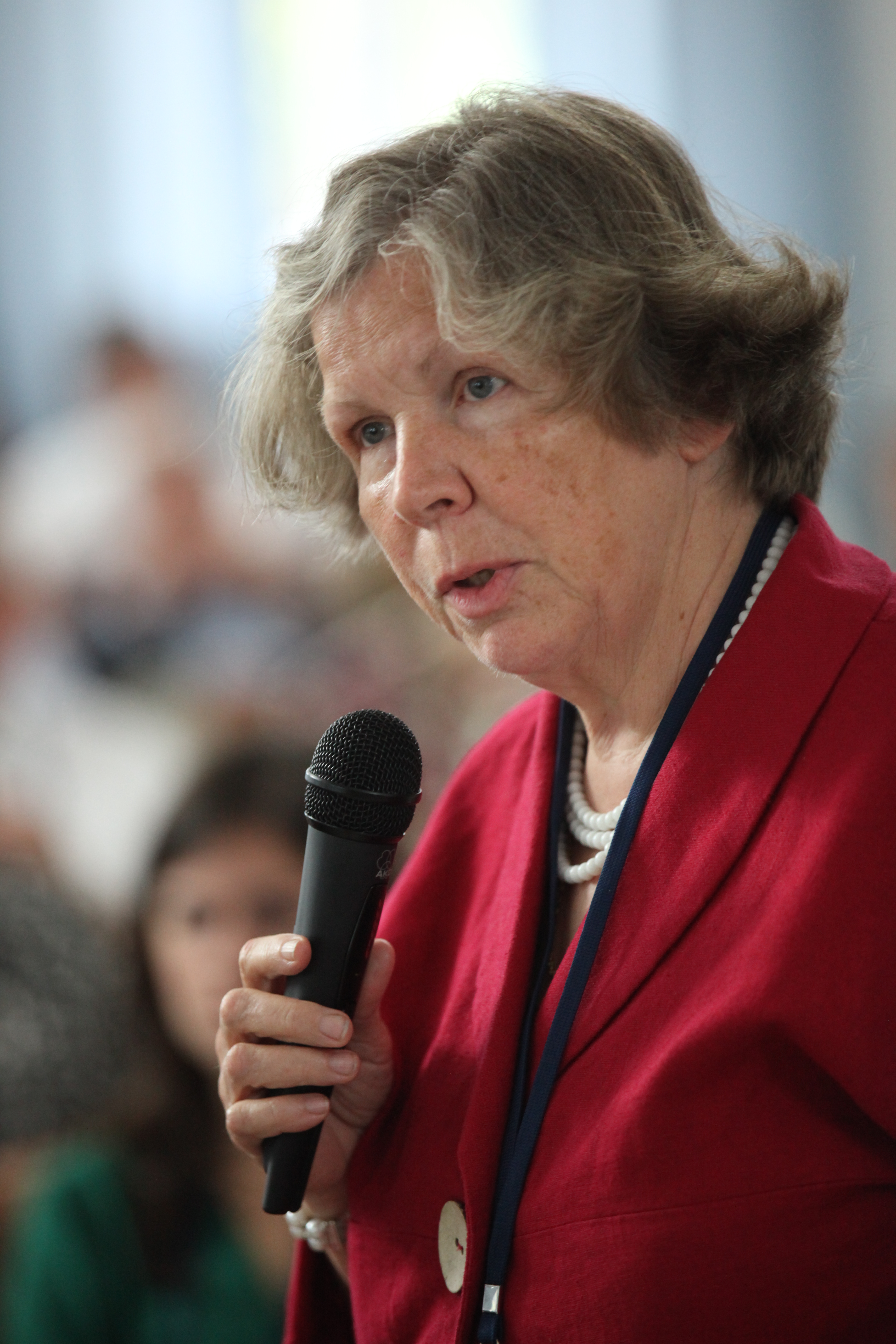 Hanna-Barbara Gerl-Falkovitz auf der RPP-Fachtagung "Islamophobie" in der Wiener Moschee